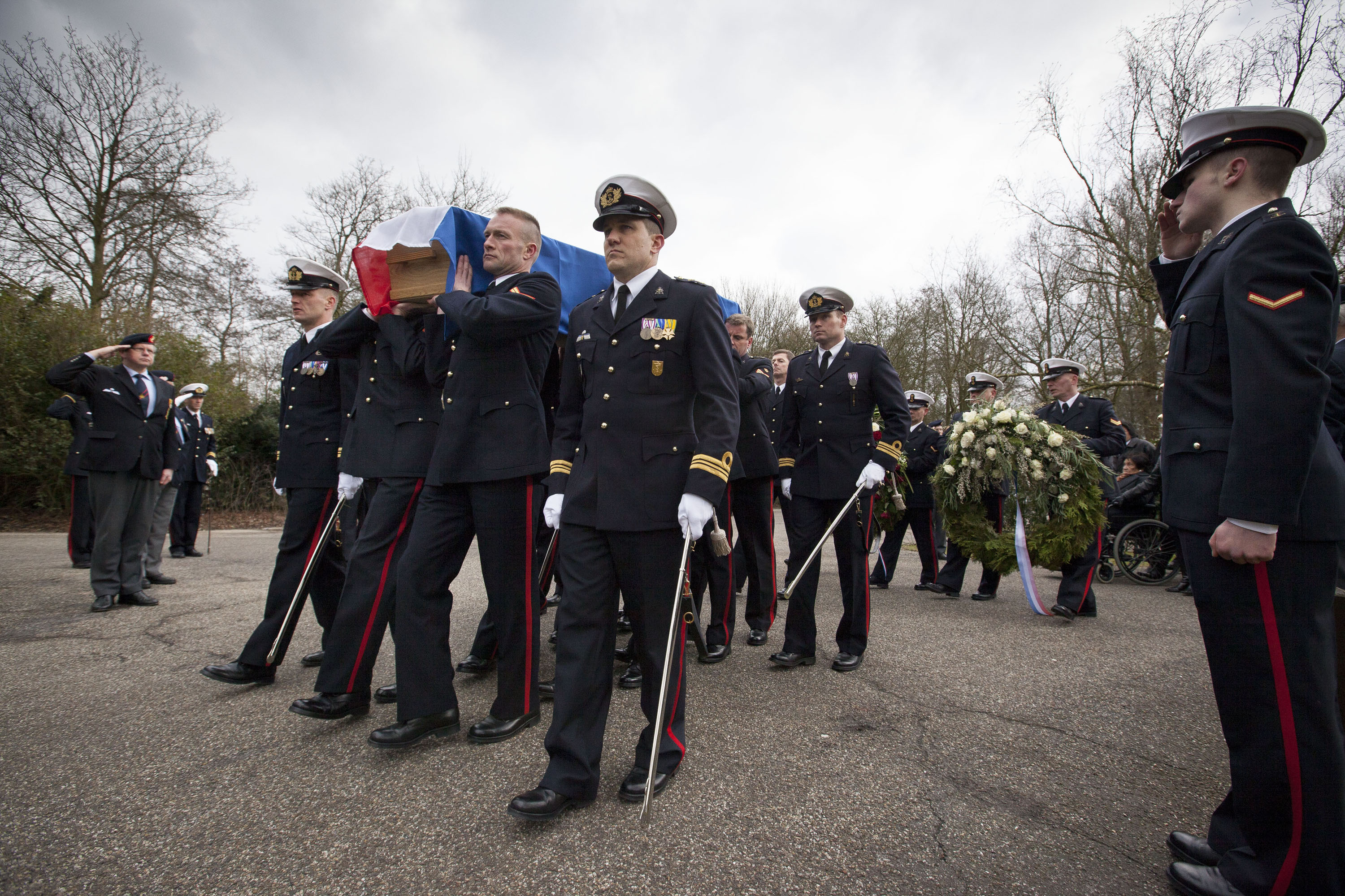 Begrafenis van Giovanni Hakkenberg, Ridder in de Militaire Willemsorde